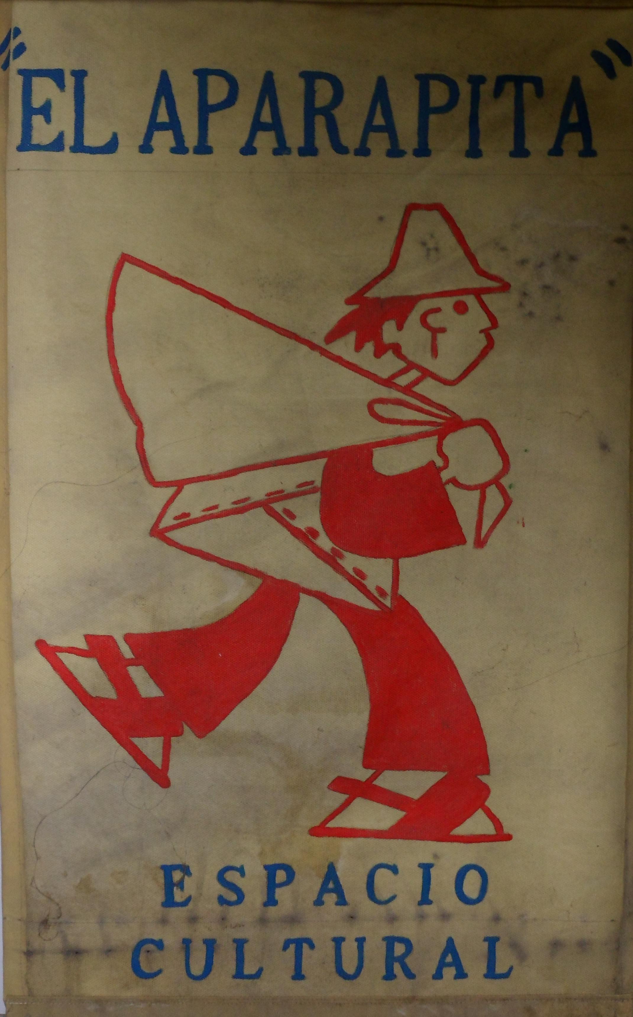 Fotografía del cartel del Centro Cultural el Aparapita de Elías Blanco Mamani